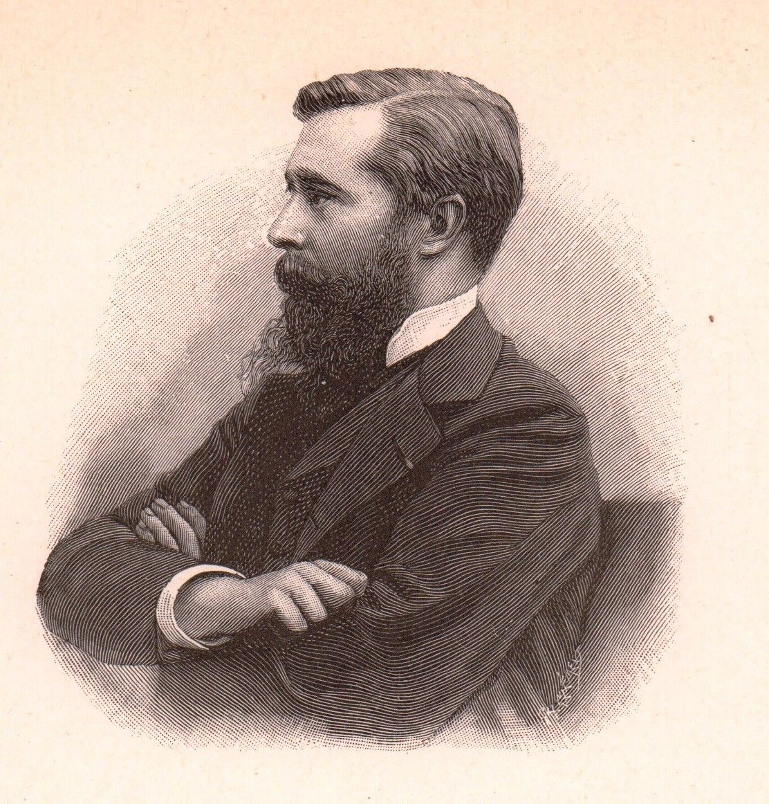 French politician André Lebon (1858-1938)